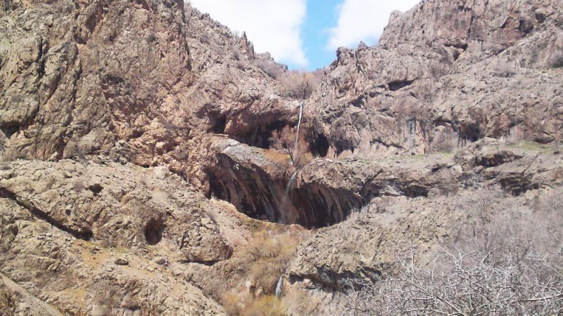 کوه و آبشار - کهمان